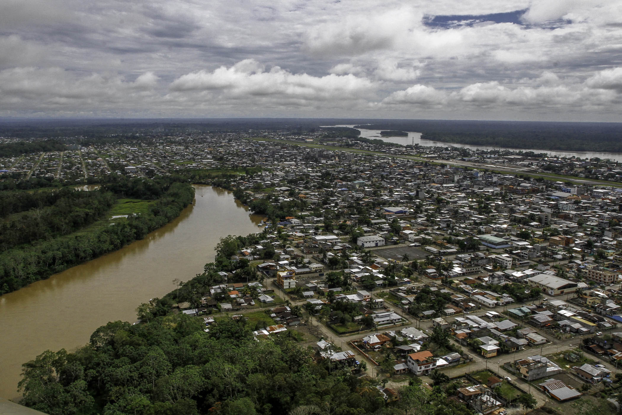 Coca, 21 de mayo (Andes).- Por medio del Ministerio del Ambiente se realizó una visita al Parque Nacional Yasuní para constatar que se cumplan las licencias técnicas y ecológicas en la construción de las plataformas petroleras en el bloque 31. Además de varias actividades que realizó Lorena Tapia, ministra de esta cartera de estado. ANDES/Micaela Ayala V.